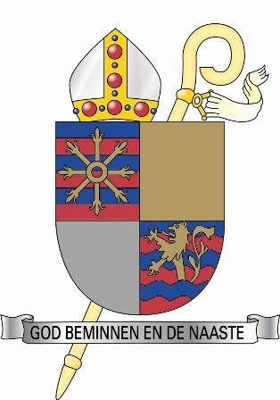 Wapen van de 70e abt van Berne